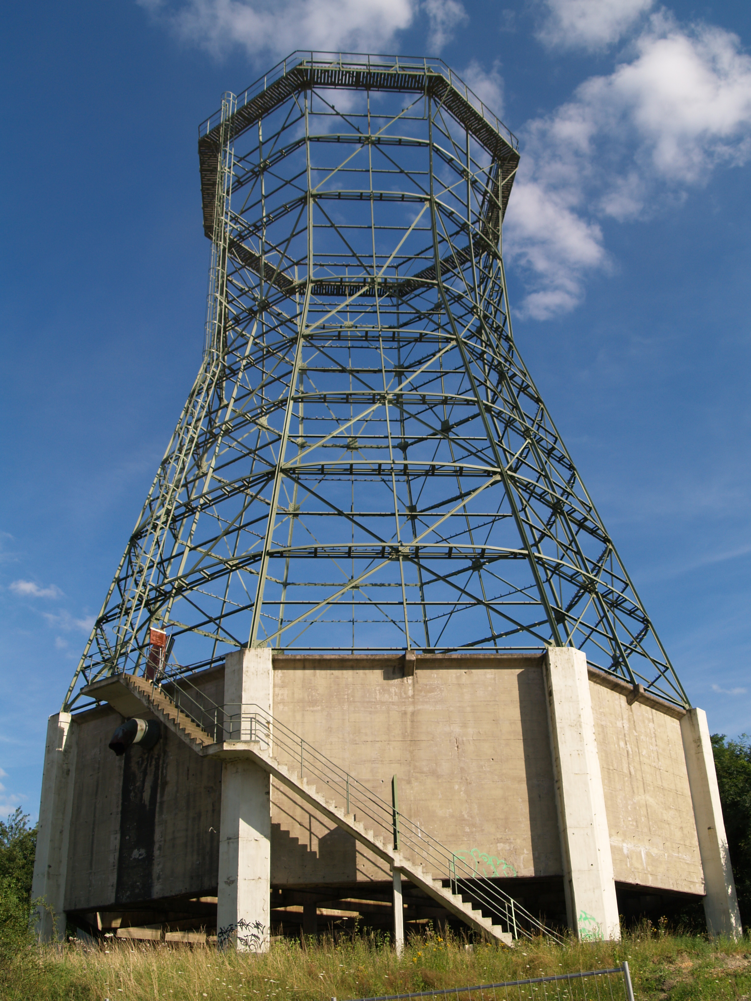 Gerippe des Kühlturms (ehemalige Kokerei in Fürstenhausen)